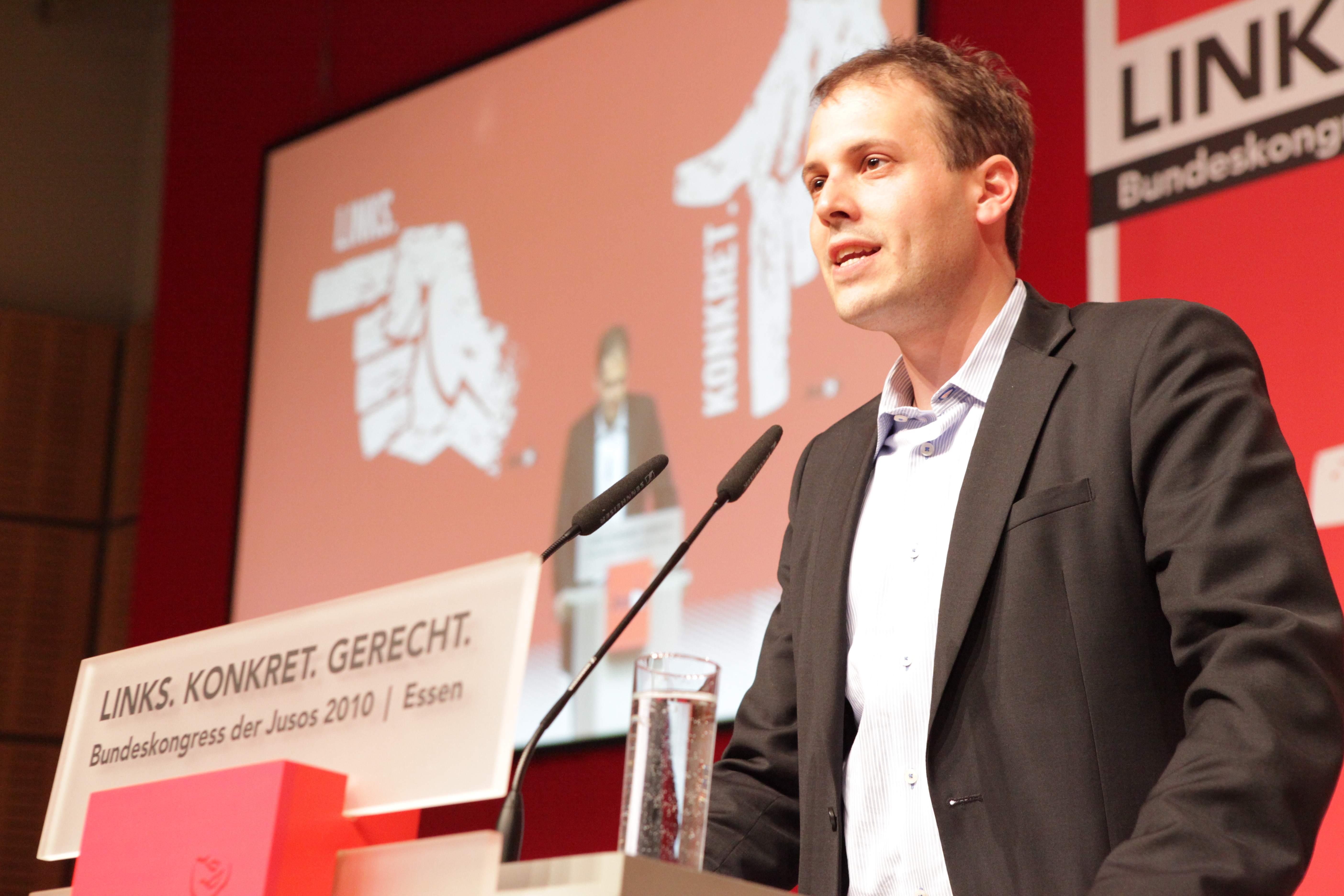 Sascha Vogt stellt sich auf dem Juso-Bundeskongress 2010 in Essen vor und wird kurz darauf mit 68,1 Prozent zum neuen Juso-Bundesvorsitzenden gewählt.